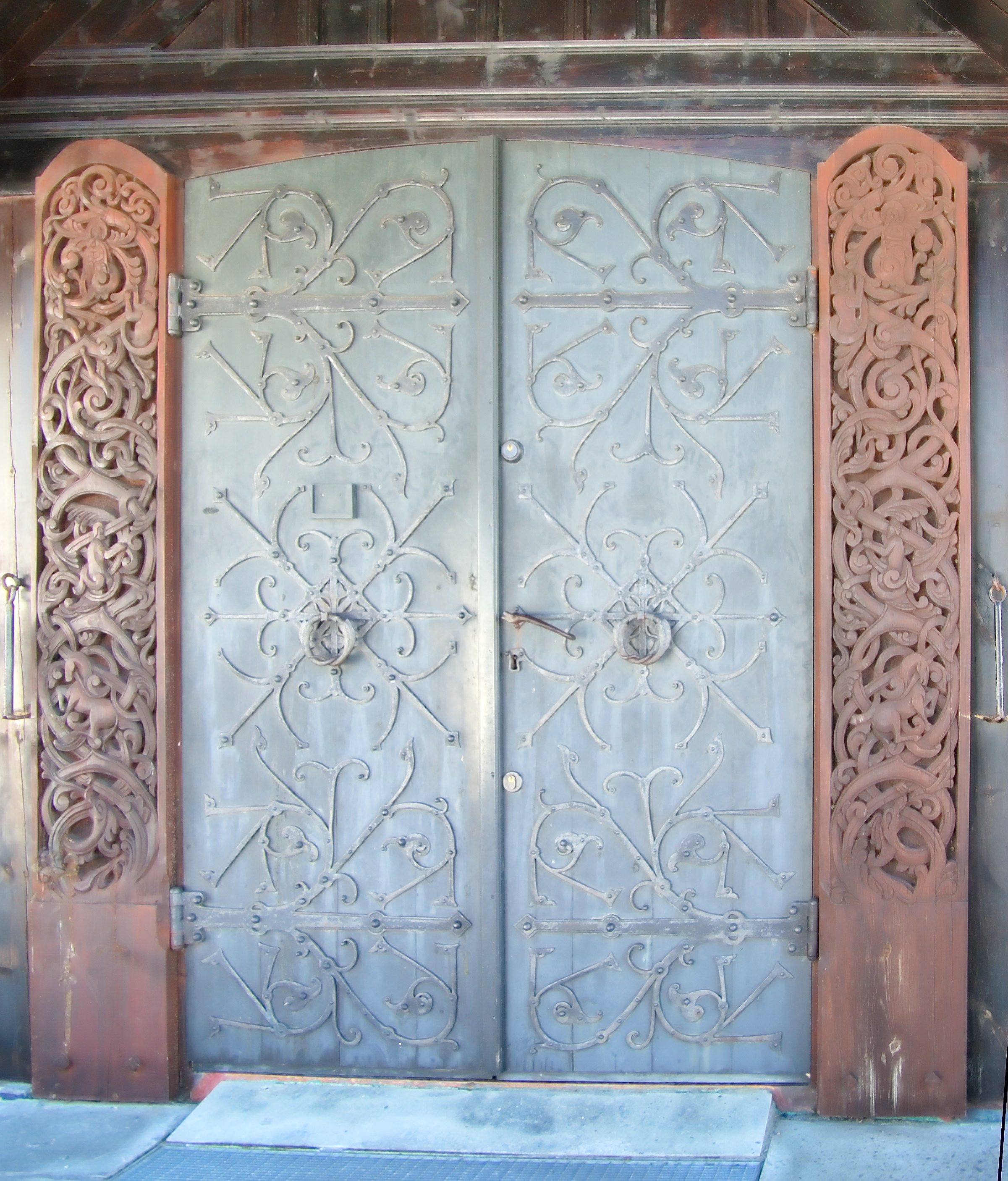 Holmenkollen kapell, inngangsdør.